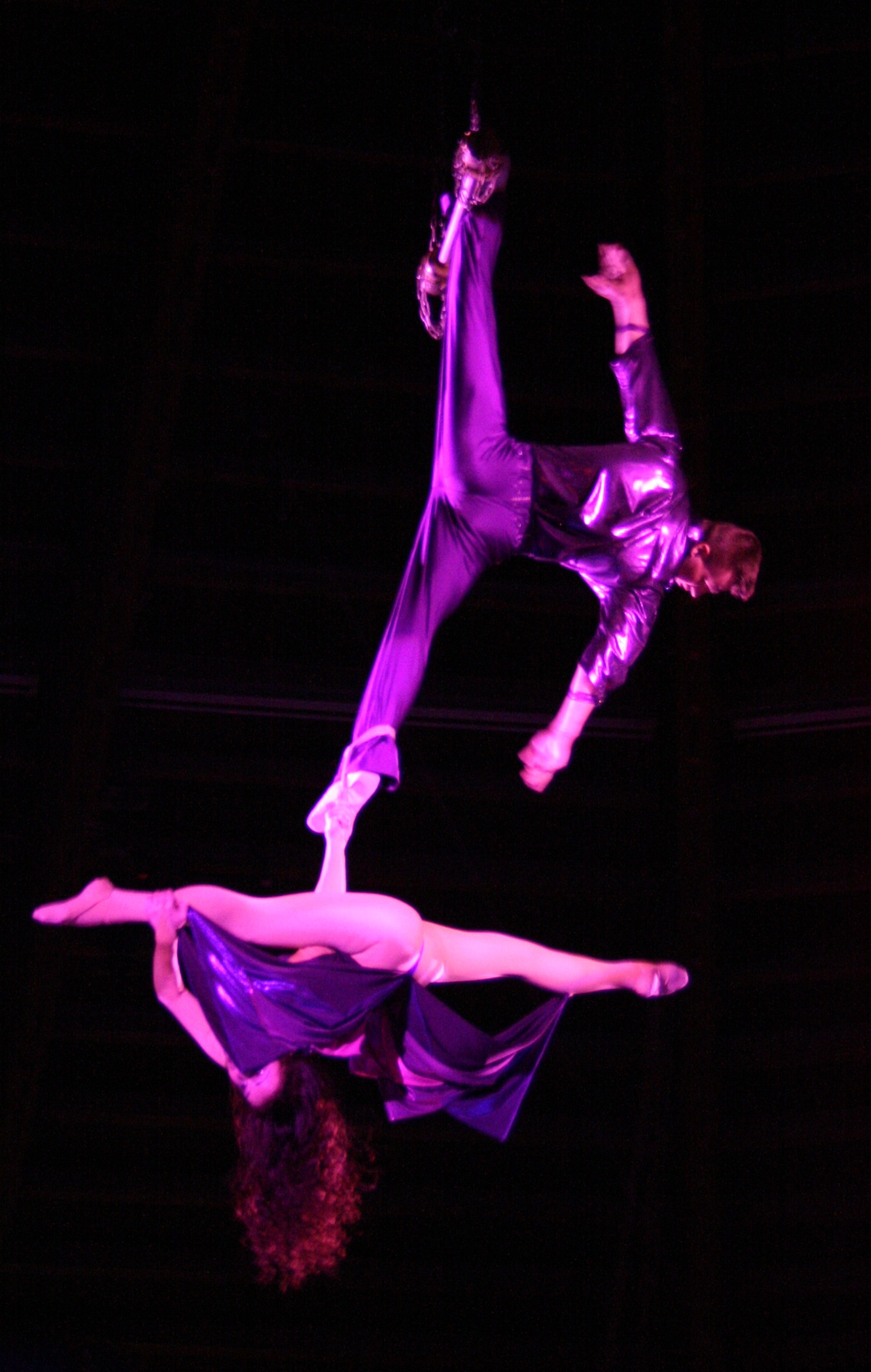 Duo Pisarevi aus Russland am Schwungtrapetz.